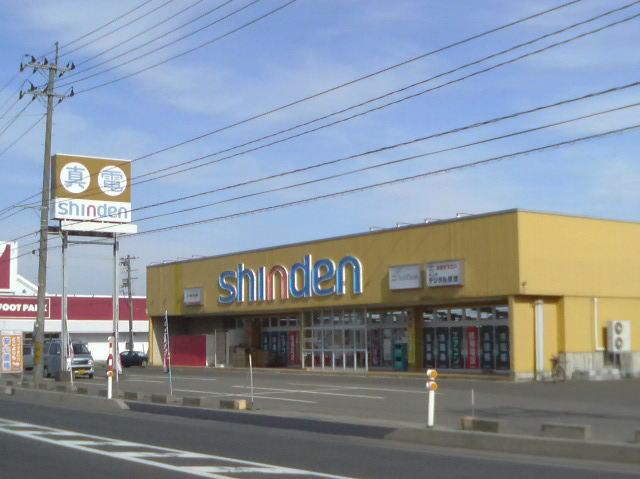 真電巻店